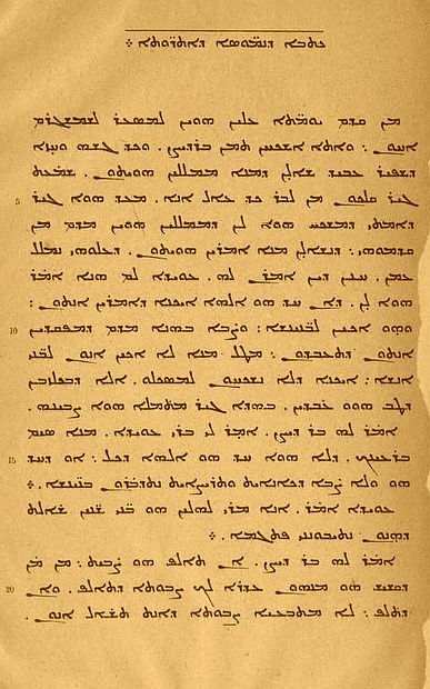 Inicio de la obra, en el siriaco original, del "Libro de las leyes de los países"o "Diálogo sobre el Destino" del escritor, poeta y filósofo, Bardaisan de Edesa (154-222 e.c.), reseñado por el orientalista francés François Nau (1864-1931) en su obra "Une biographie inédite de Bardesane l'astrologue", publicada en París en 1897.